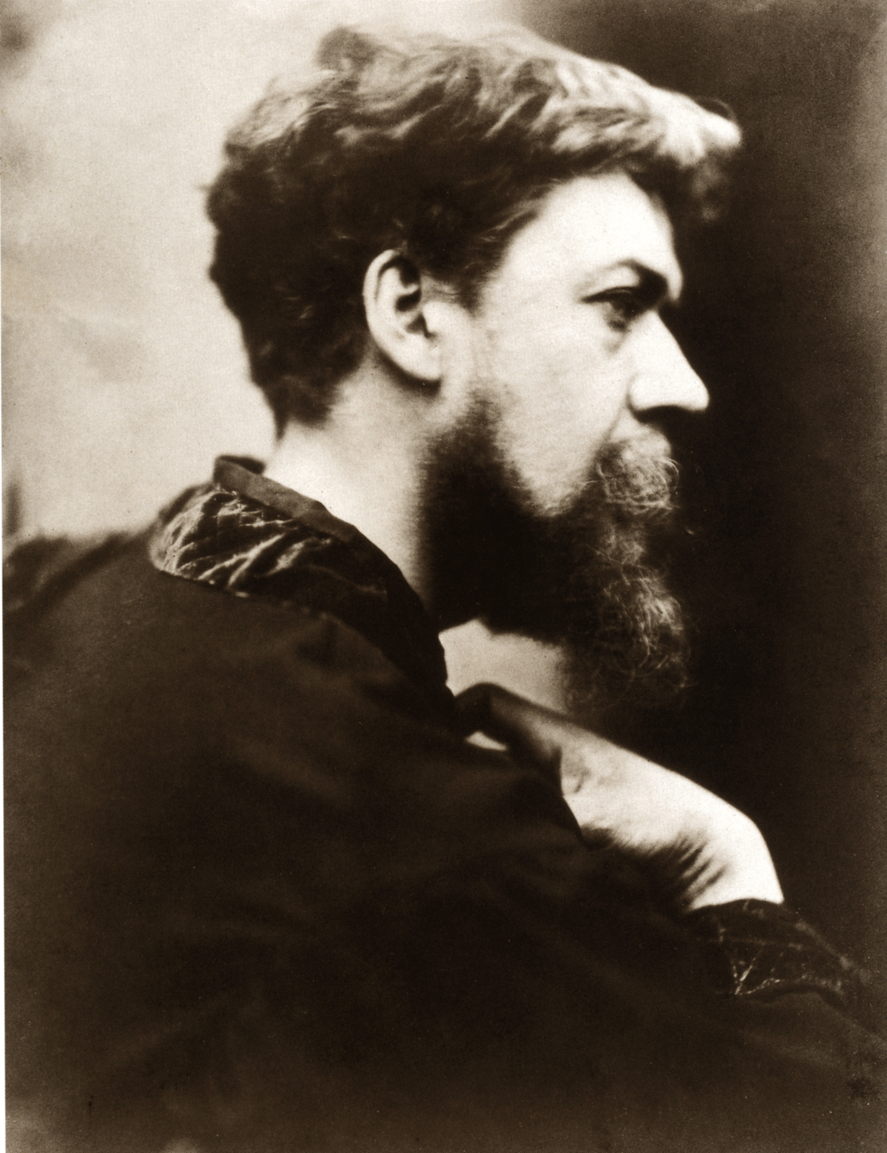 Self-portrait